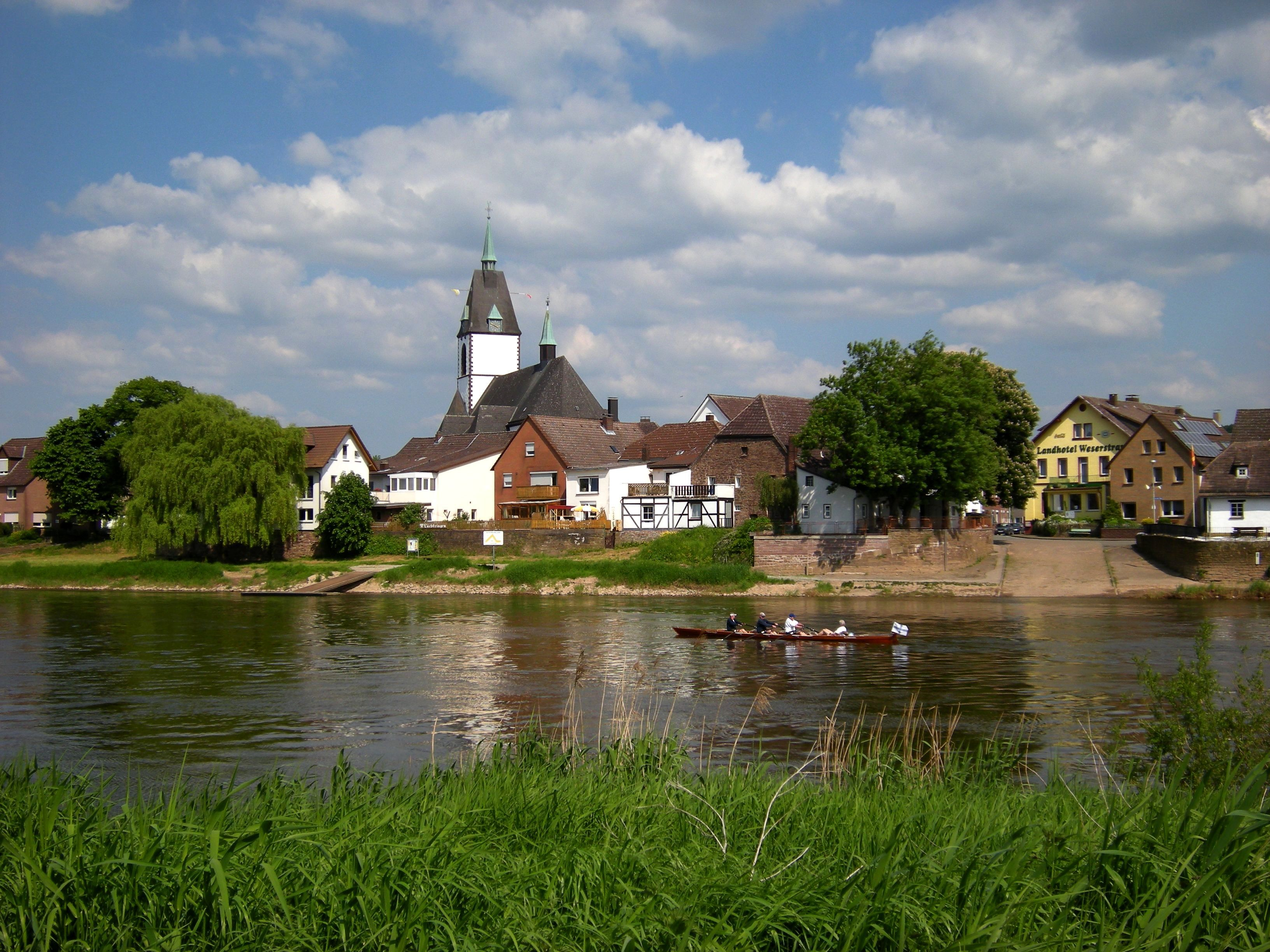 Höxter-Lüchtringen mit Weser